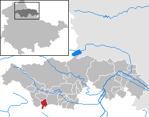 Freienbessingen in Thuringia - Kyffhäuserkreis